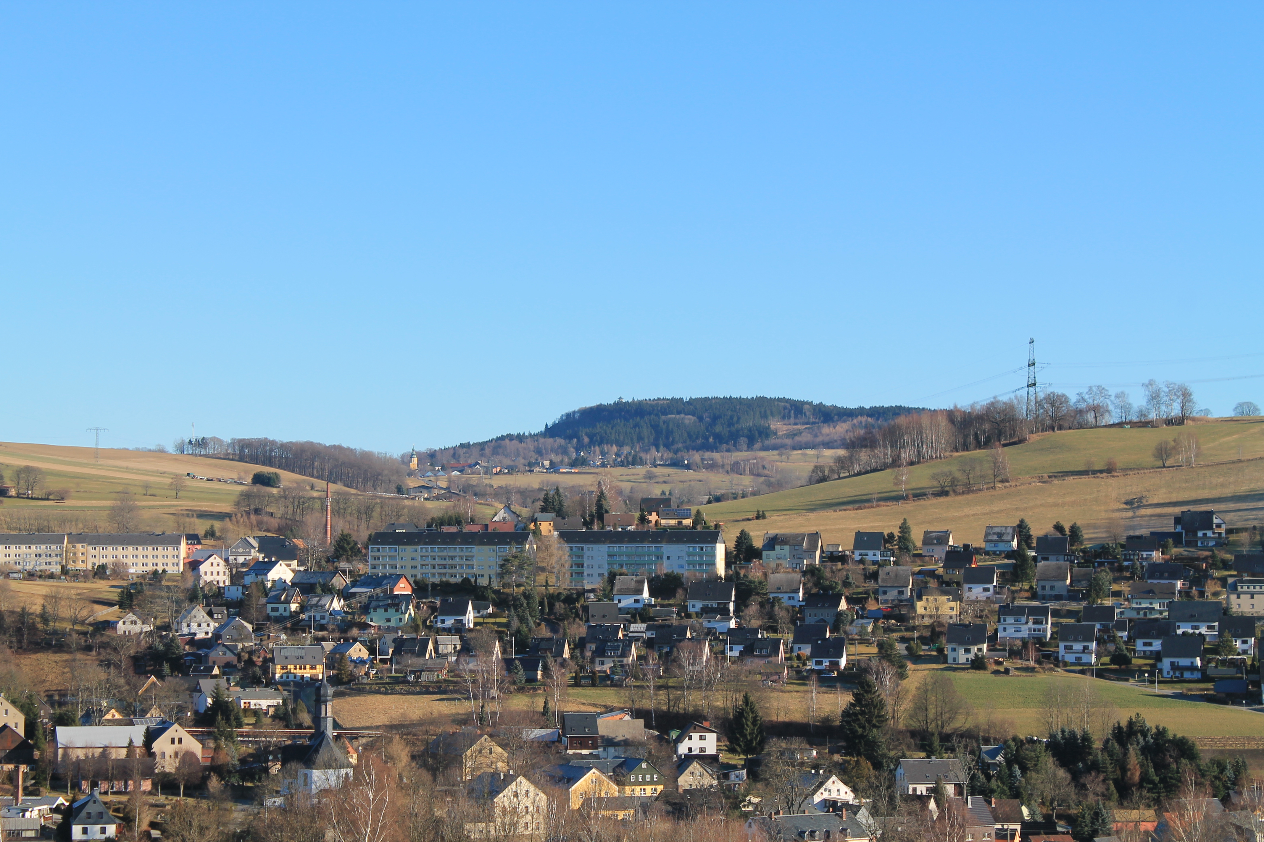 Blick über Markersbach zum Scheibenberg. Markersbach, Sachsen, Deutschland.